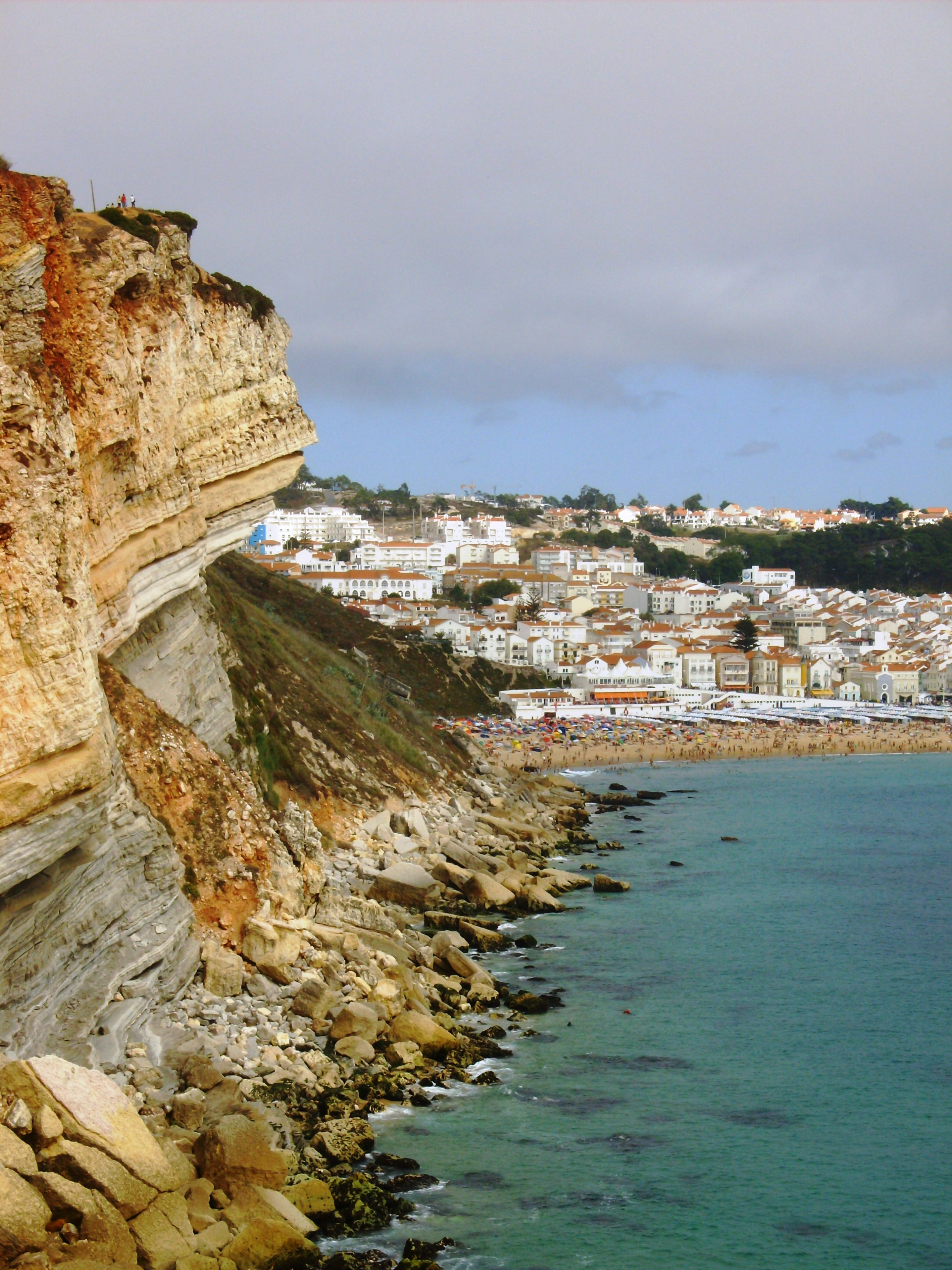 Aspecto de falésia na Nazaré, Portugal.